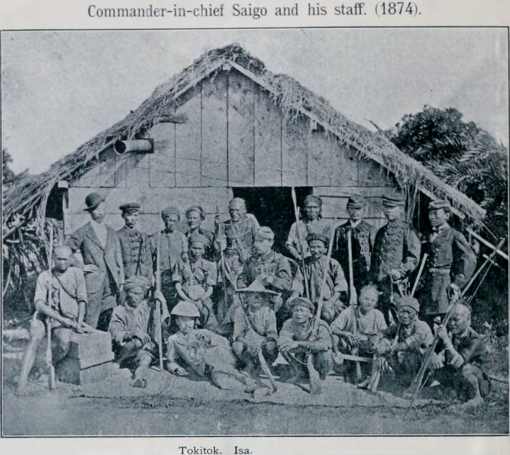 中坐者:日軍都督西鄉從道；其左:Tokitok (Tot-e-tok)卓杞篤，其右:Isa (Issek)以瑟；前排左三躺者:水野遵；後排左一:大倉喜八郎(?)